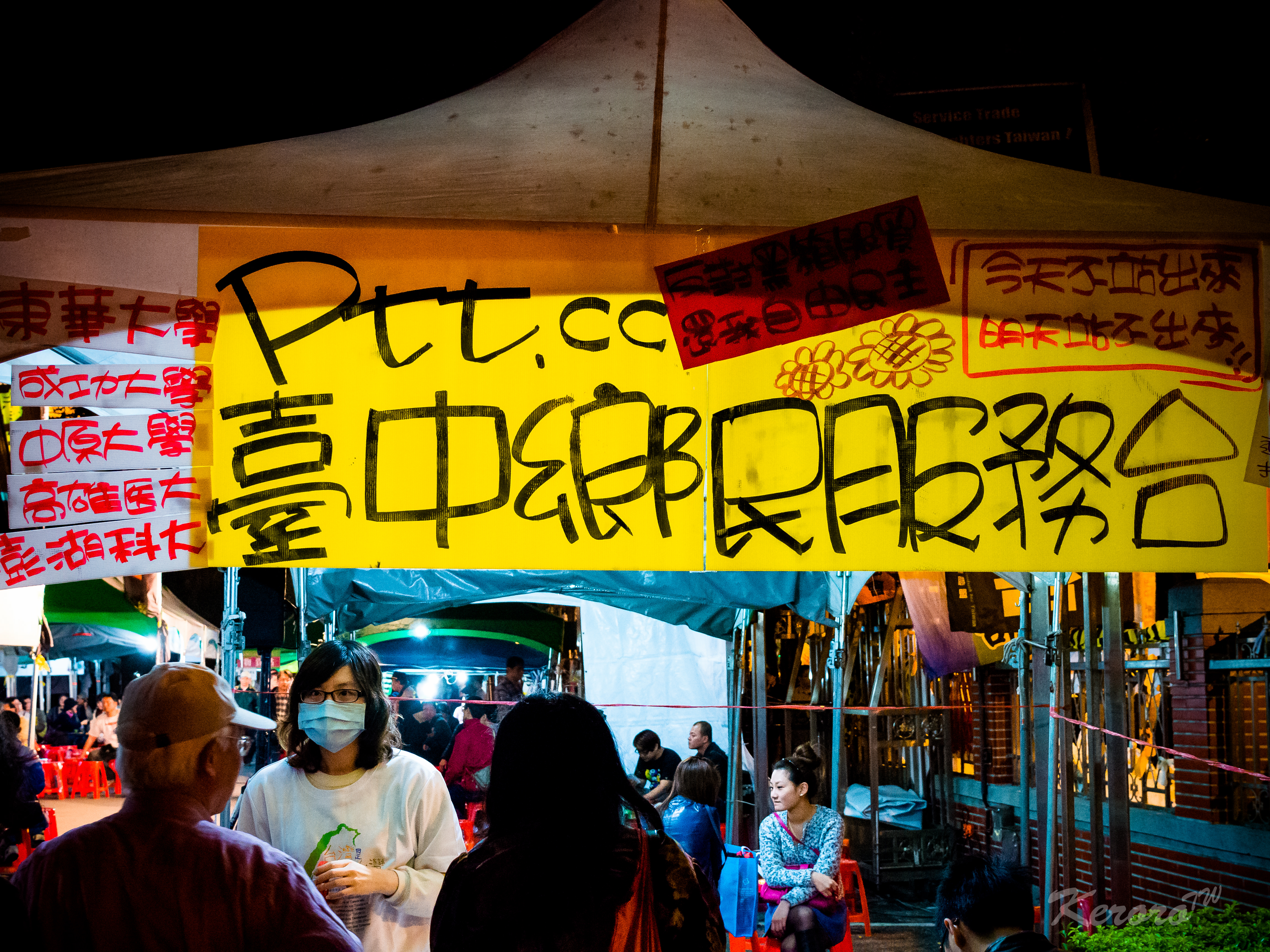 OLYMPUS DIGITAL CAMERA 2014-03-24 立法院